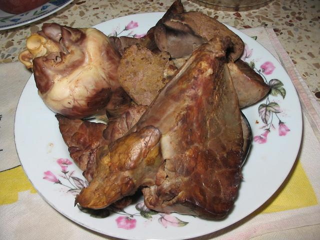 лівер кулінарний. відварені волове серце та легені